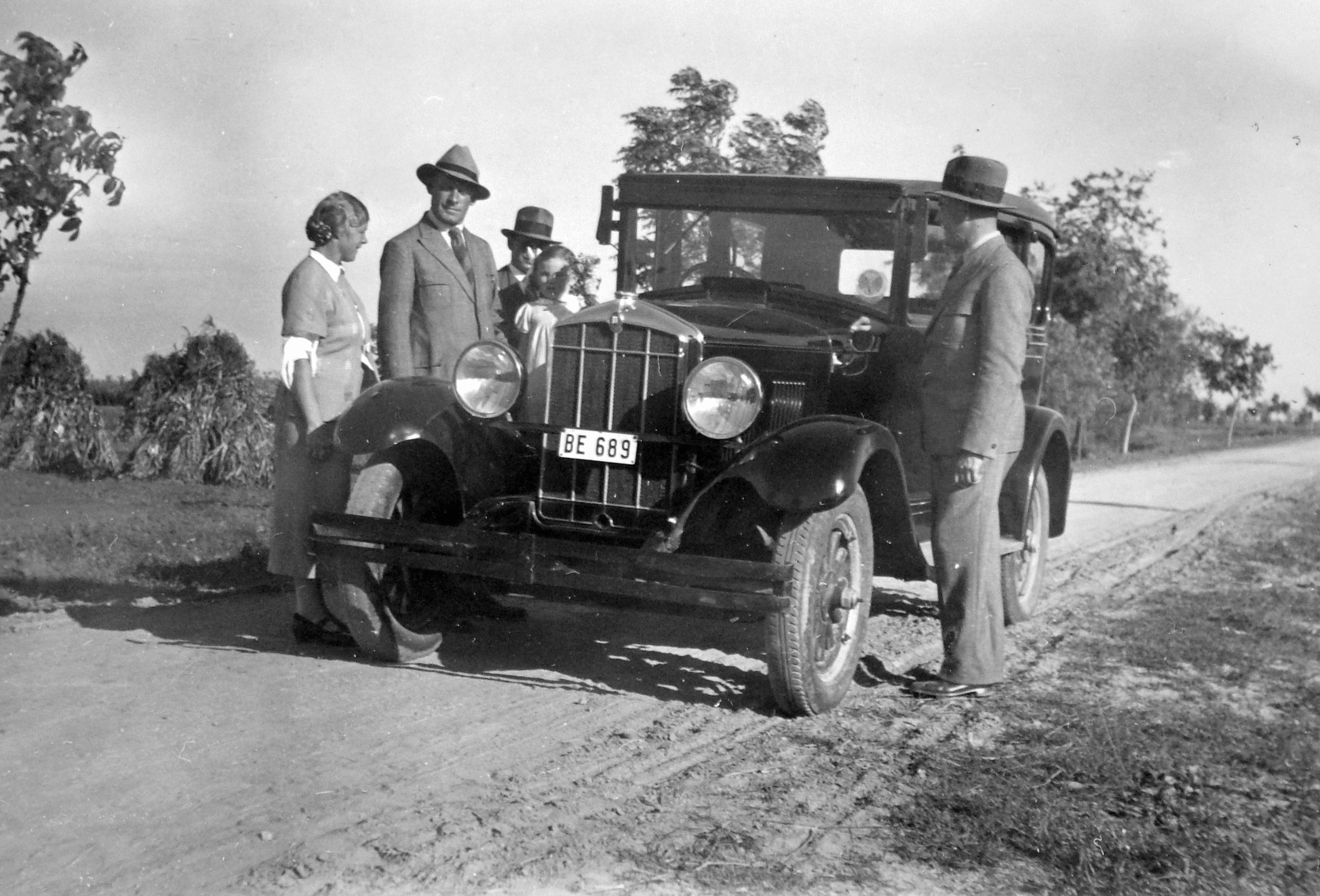 Amerikai gyártmányú Durant gépkocsi. Tags: automobile, american brand, Durant-brand, number plate Title: Amerikai gyártmányú Durant gépkocsi.